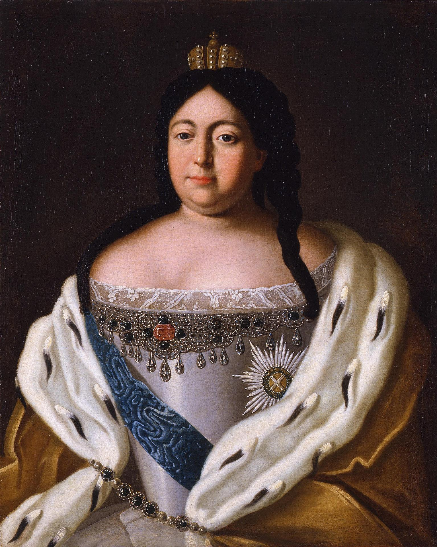 Неизвестный художник, Россия, XVIII в.